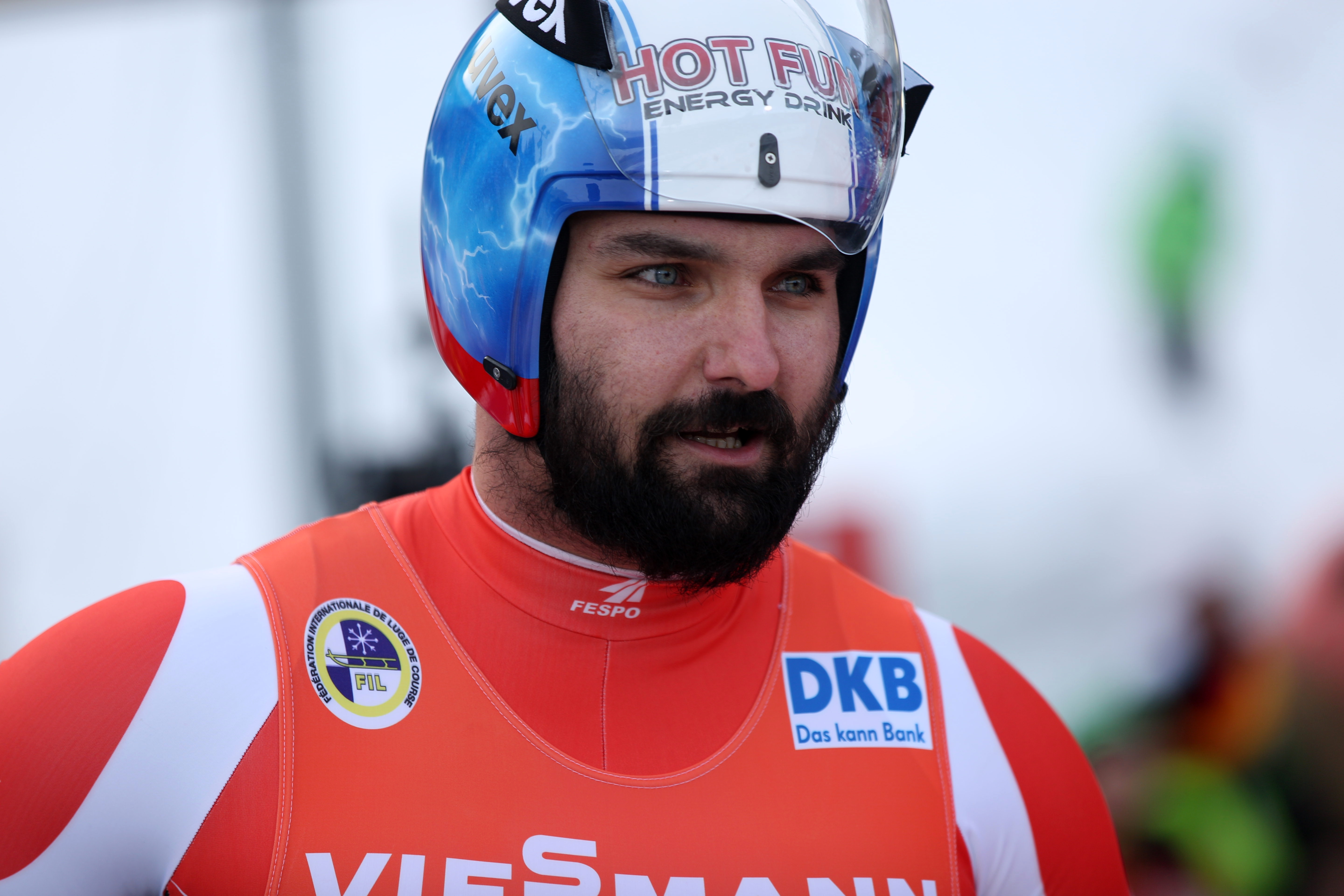 Maciej Kurowski beim Rennrodel-Weltcup der Herren in Oberhof 2017